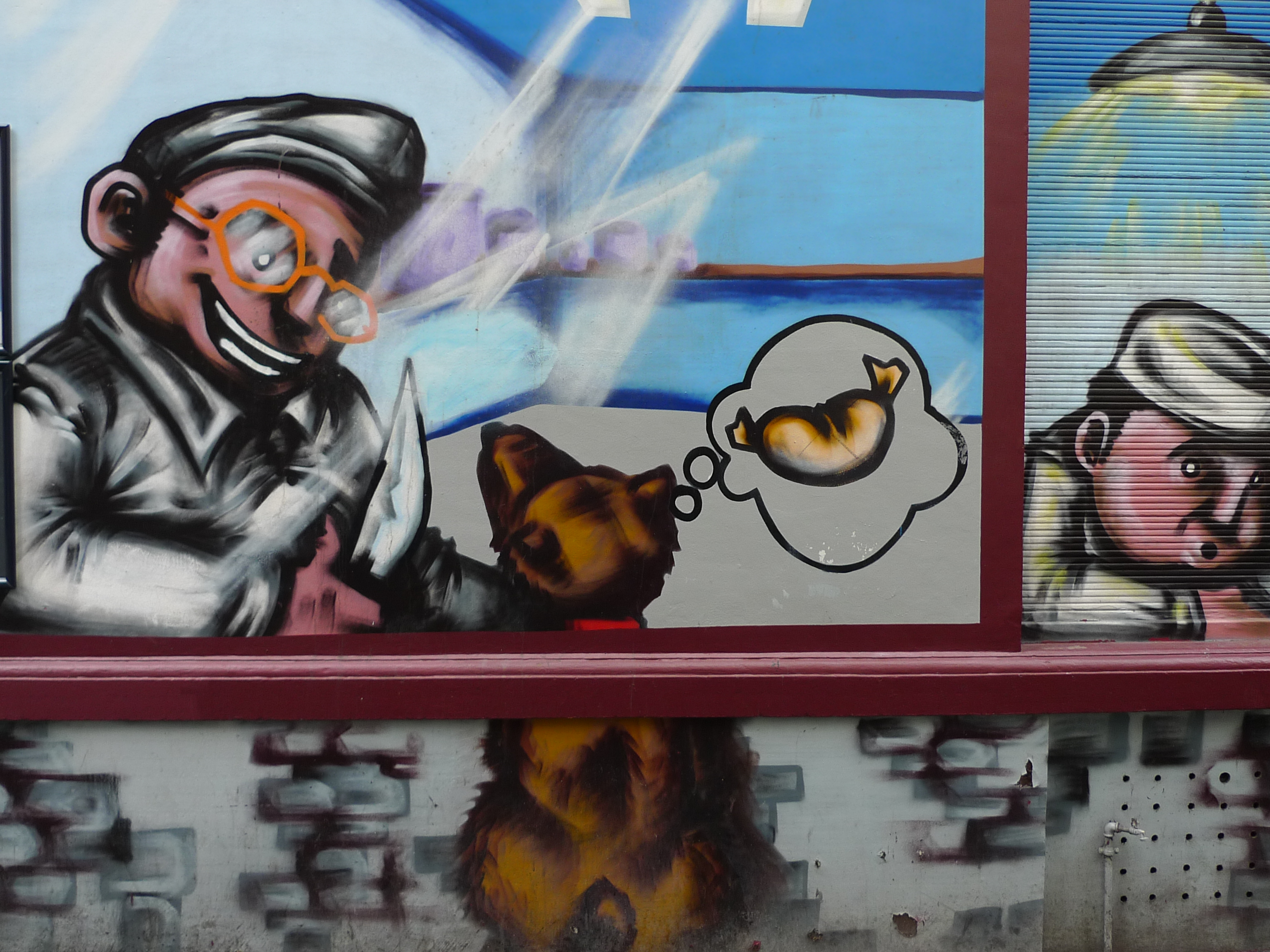 Art urbain